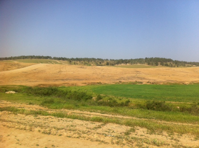 כרמית 2012